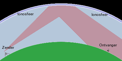 Principe korte golf. Zelfgemaakte afbeelding.